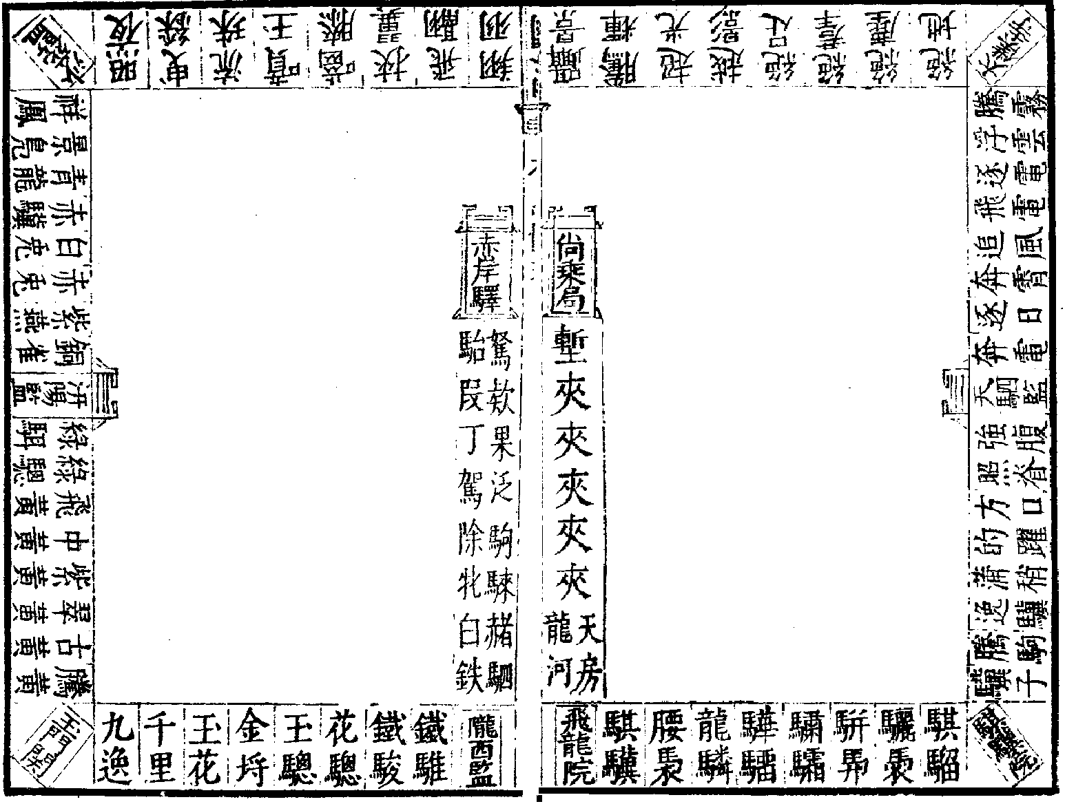 中文（台灣）: 李清照打馬圖